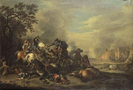 Marzio MASTURZO (Actif à Naples vers 1700) - Scène de bataille